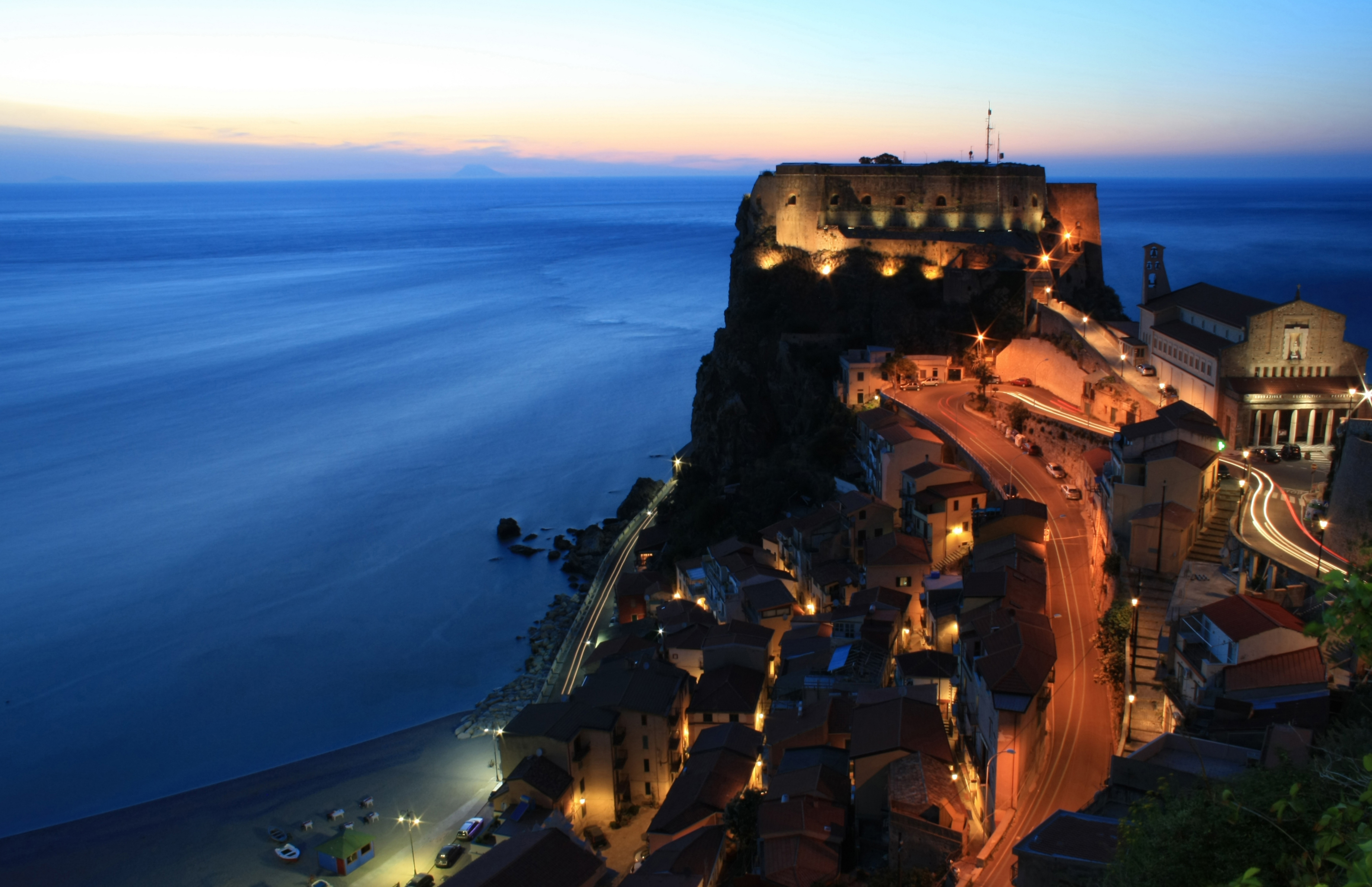 Castello Ruffo a Scilla (Italy).